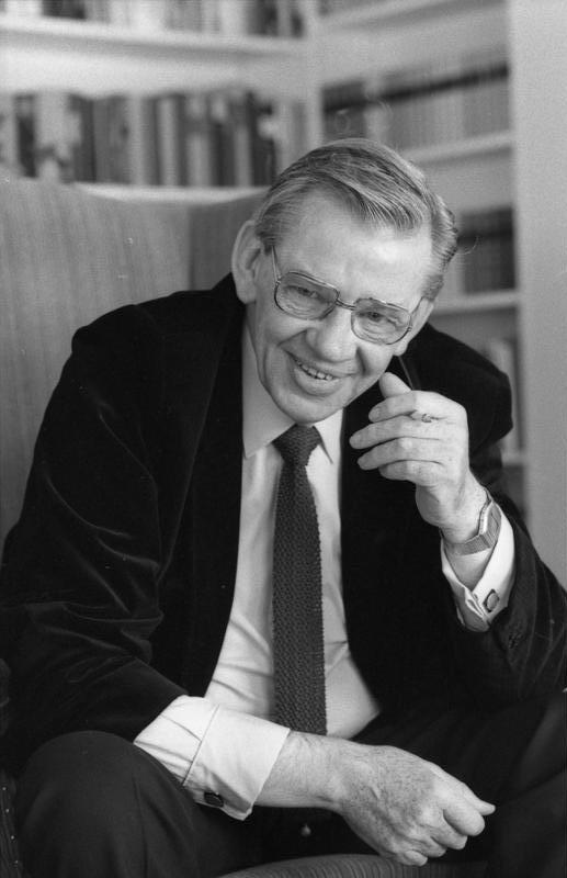 Hanns Anselm Perten ADN-ZB/Sindermann/31/07/82/ Rostock: Seit fast dreieinhalb Jahrzehnten ist Prof. Hanns Anselm Perten als Theaterintendant tätig. Ab 1952 leitete er, mit einer zweijährigen Unterbrechung, das Ensemble des Volkstheaters Rostock als dessen Generalintendant. Thematische und ästhetische Vielfalt im Streben nach höchster Qualität der Inszenierung, die Weltoffenheit des Spielplanes und das Nutzen neuer origineller Formen theatralischer Darbietungen verleihen dem Volkstheater eine große Ausstrahlungskraft auf nationaler sowie internationaler Ebene. Abgebildete Personen: Perten, Hans Anselm Prof.: Generalintendant des Rostocker Volkstheaters, DDR